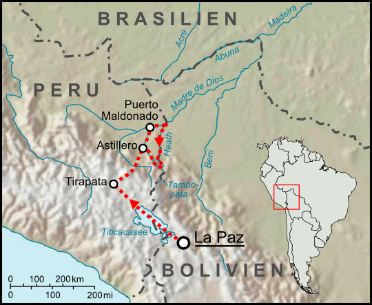 Route und Stationen der zweiten Forschungsreise des Percy Fawcett